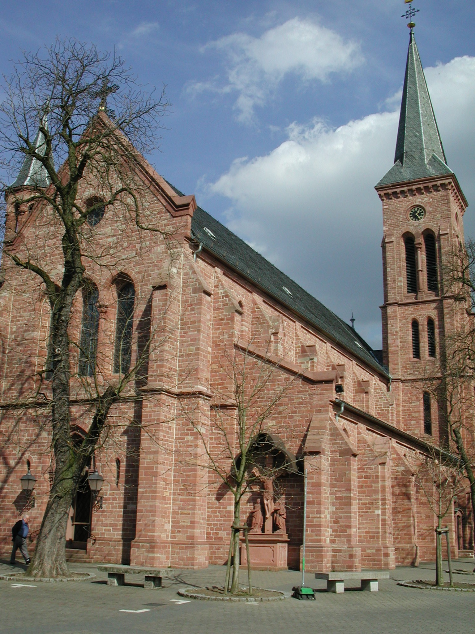 St. Nikolaus in Rodgau-Jügesheim Quelle: selbst fotografiert Fotograf/Zeichner: presse03 Datum: 18.03.2002